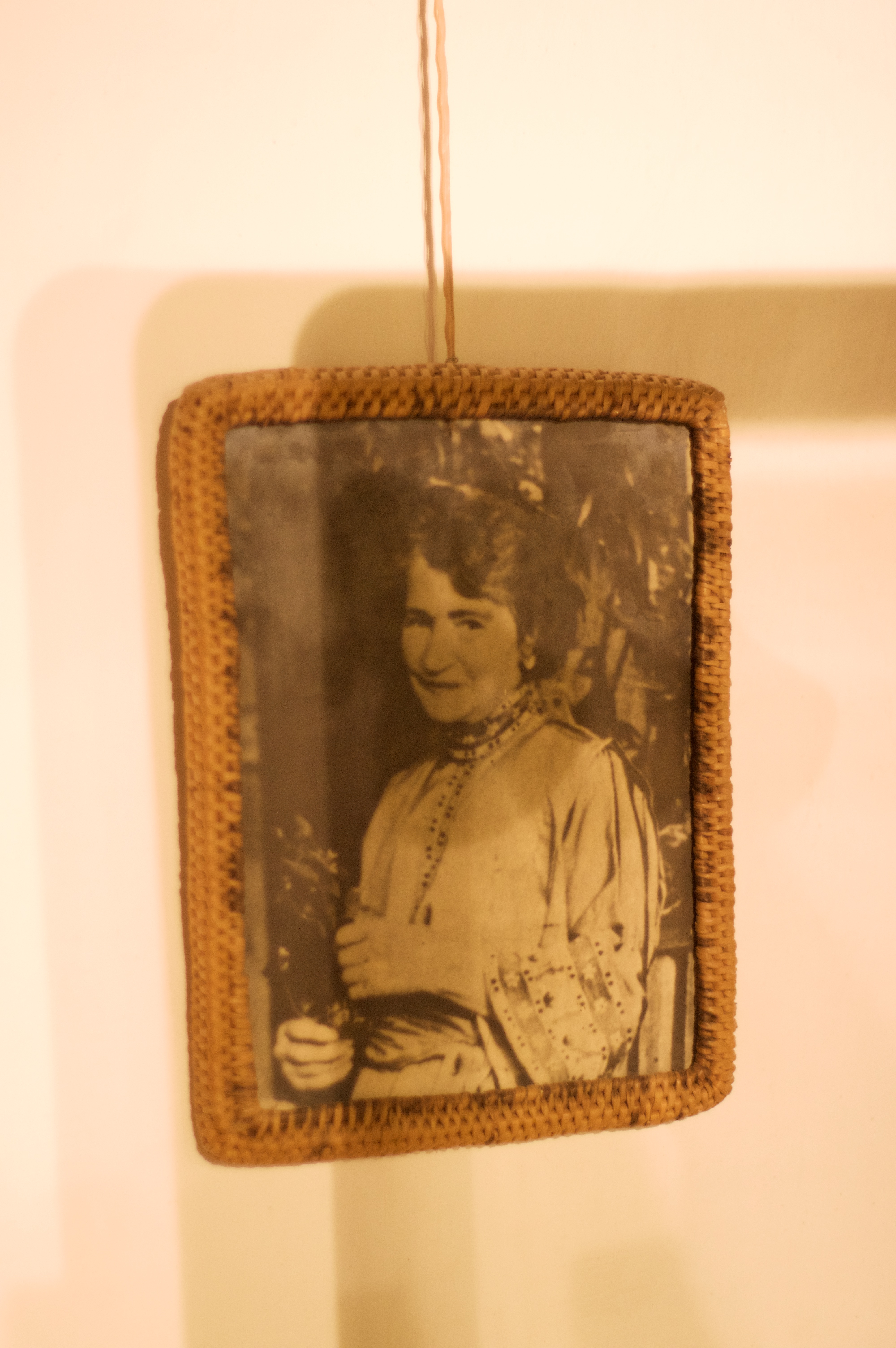 Portret Izydory Gulgowskiej z Muzeum we Wdzydzach Kiszewskich